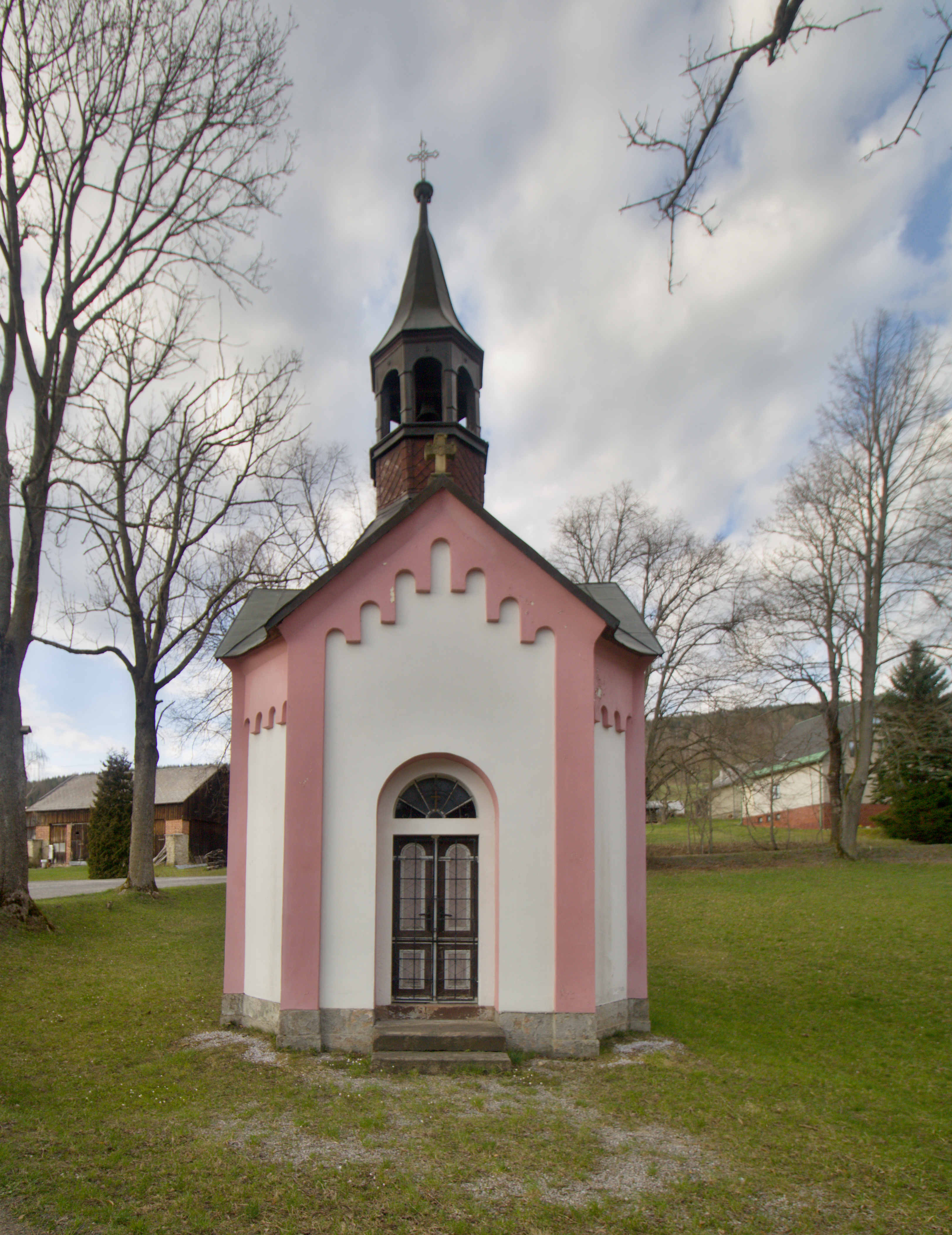 Mrklov